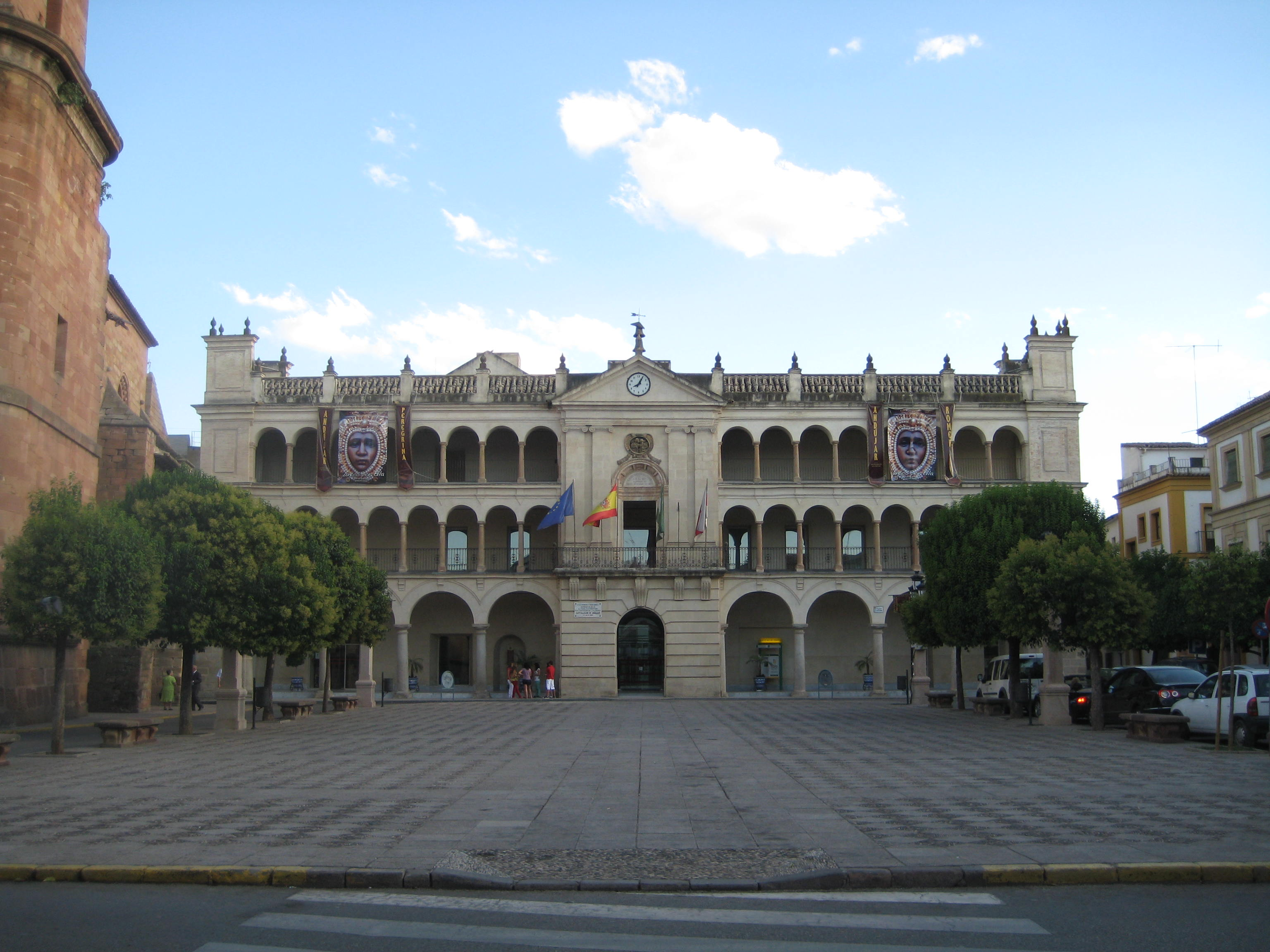 El ayuntamiento de Andújar es un antiguo corral de comedias construido entre 1621 y 1630. El cuerpo central, de estilo neoclasico, es obra del arquitecto Juan de la Mata de 1791.